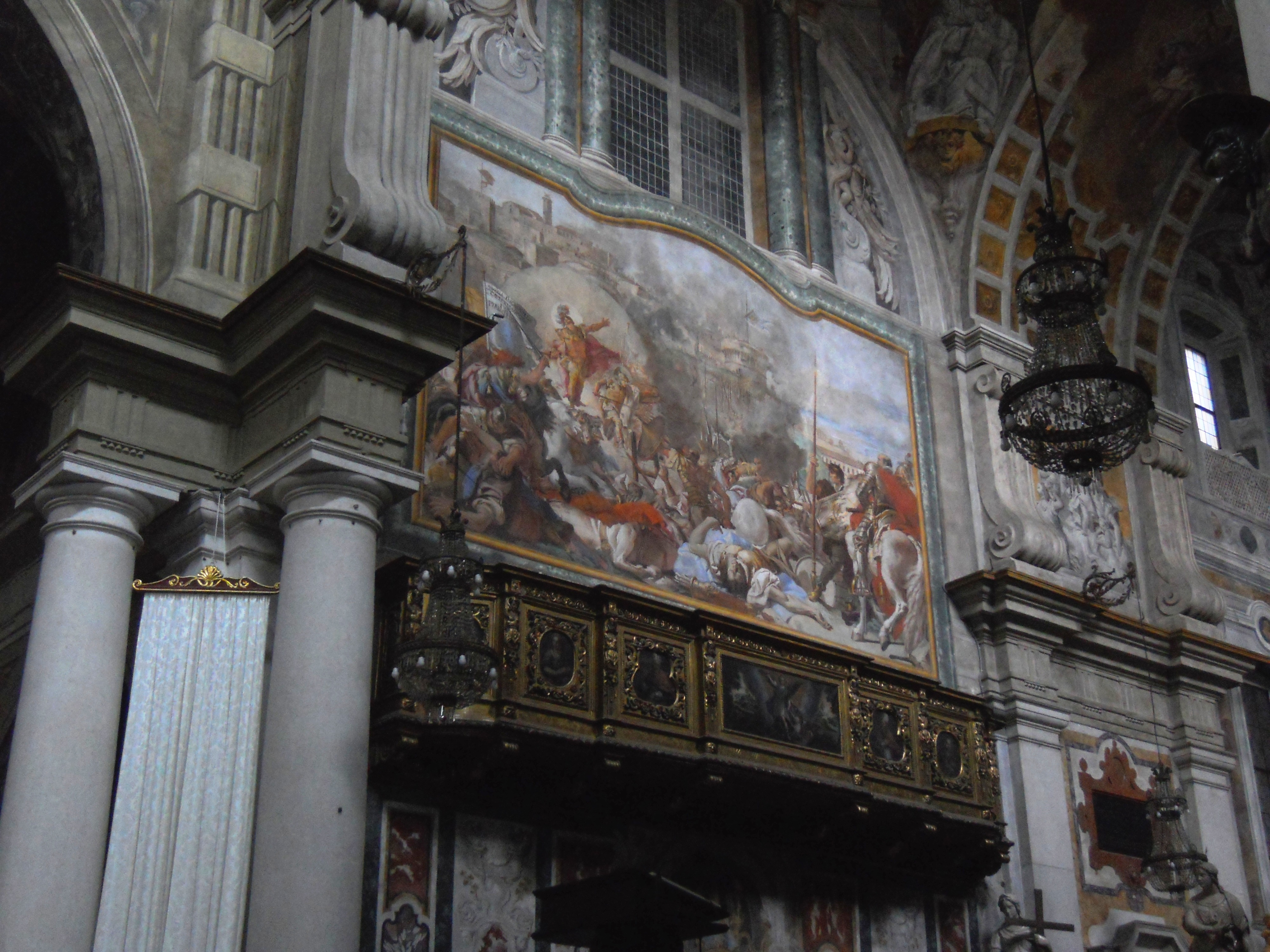 overview